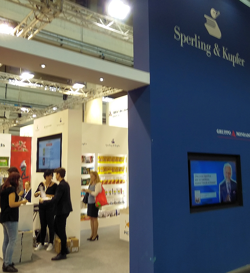 Salone del libro 2018 stand Sperling & Kupfer